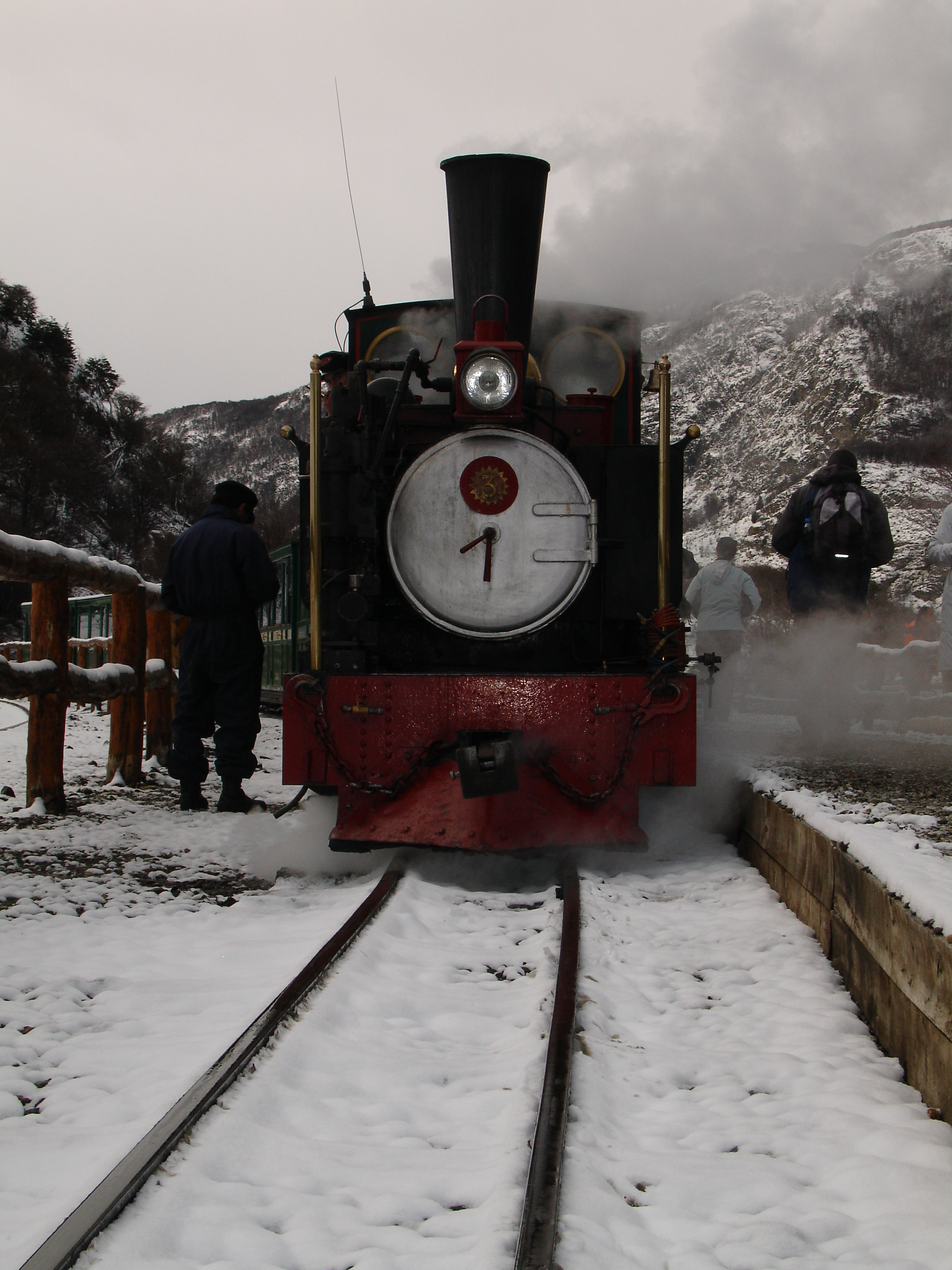 Tren del fin del mundo. Parque Nacional Tierra del Fuego. es una foto increible